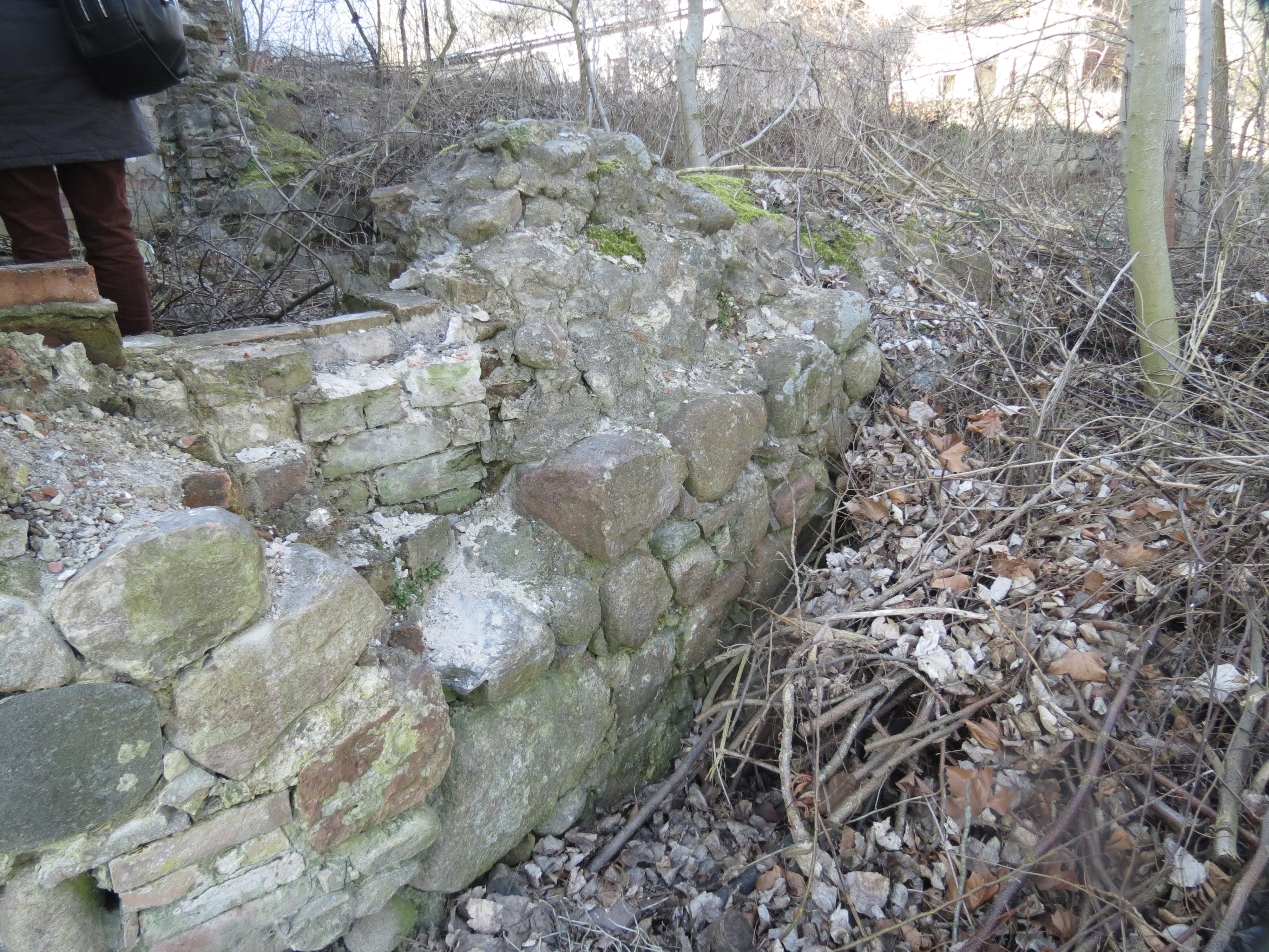 Feldsteinfundament der ehemaligen Burg (hinter dem ehemaligen Amtshaus in Flecken Zechlin, Lkr. Ostprignitz-Ruppin, Brandenburg, Deutschland